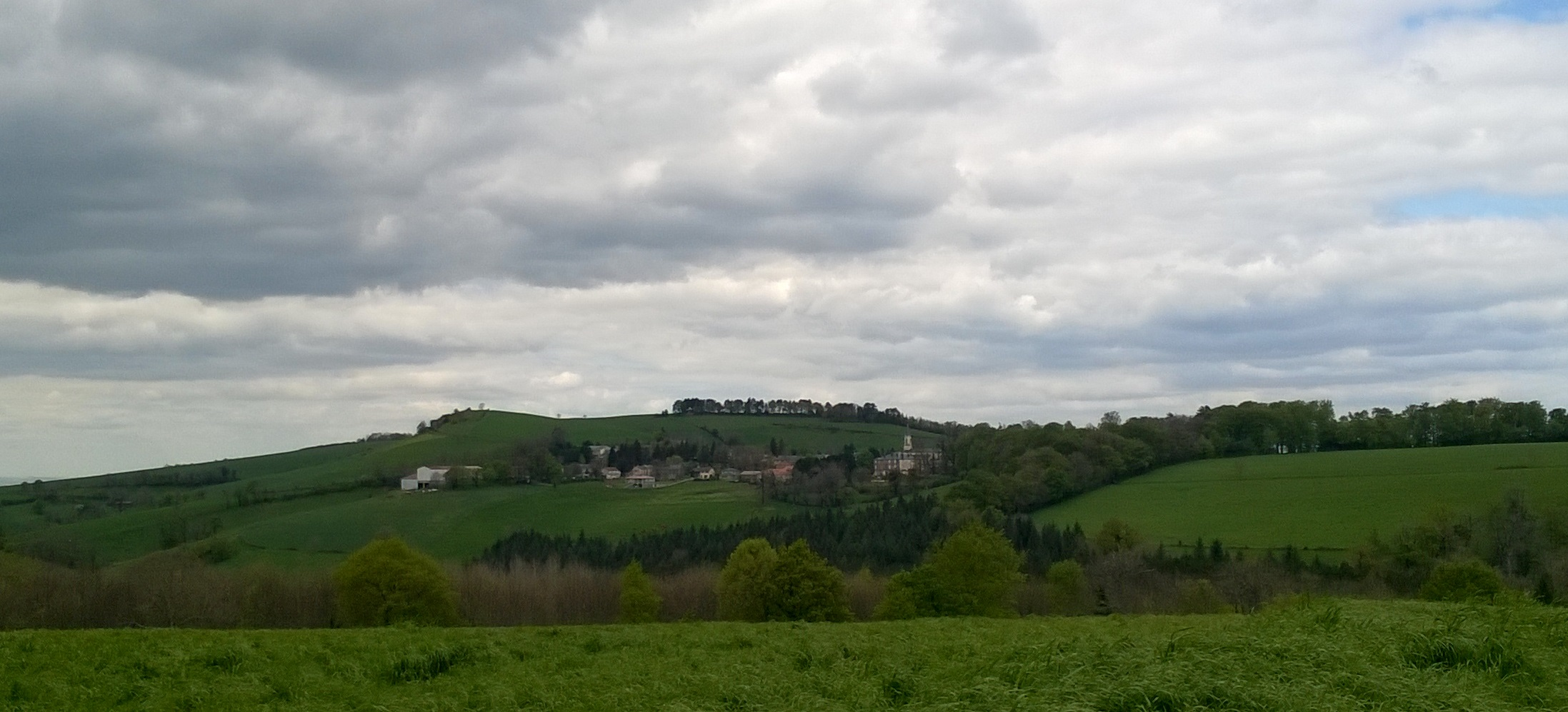 Village de Rayssac vue depuis le sud au printemps